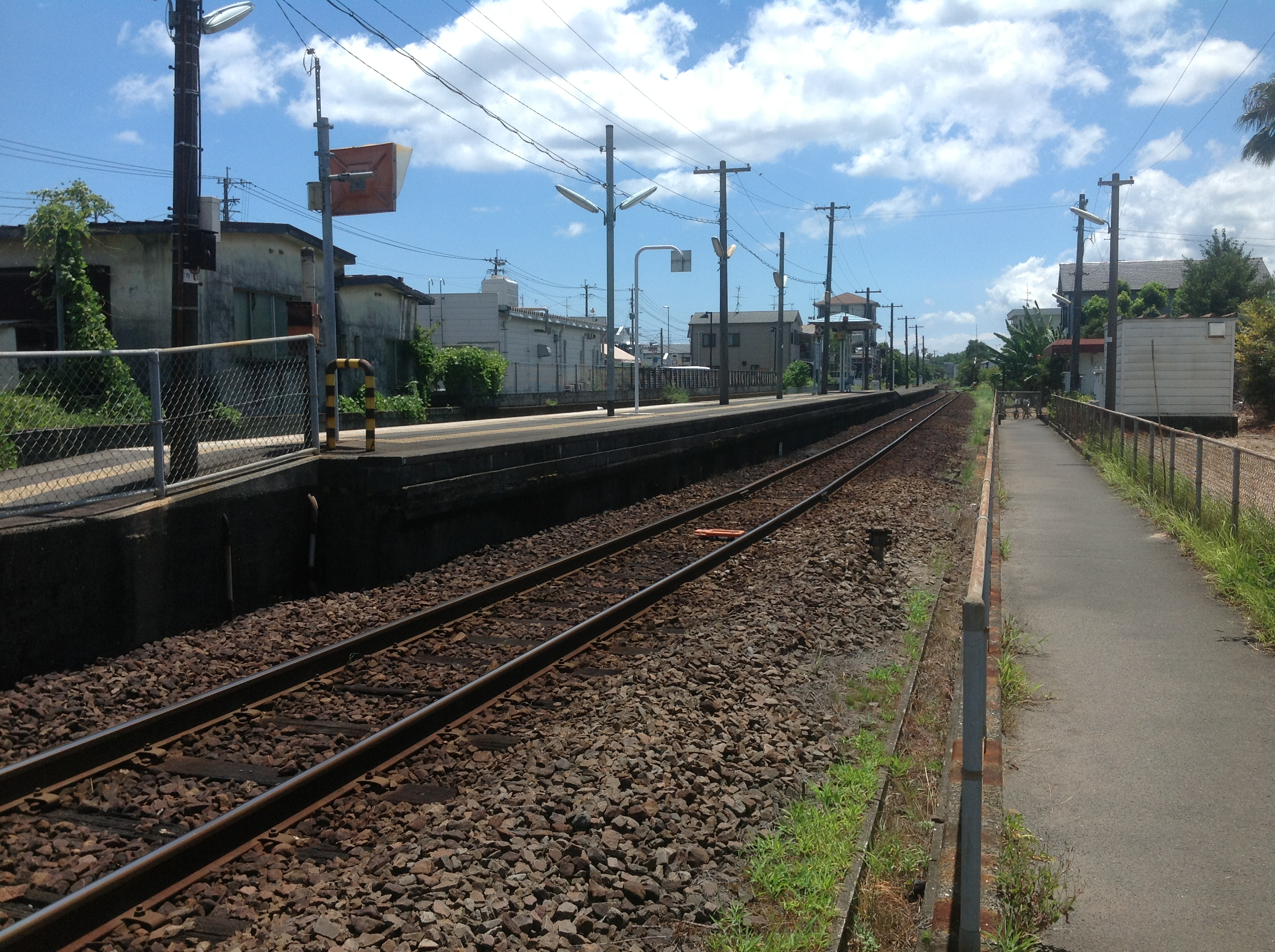 中名駅ホーム